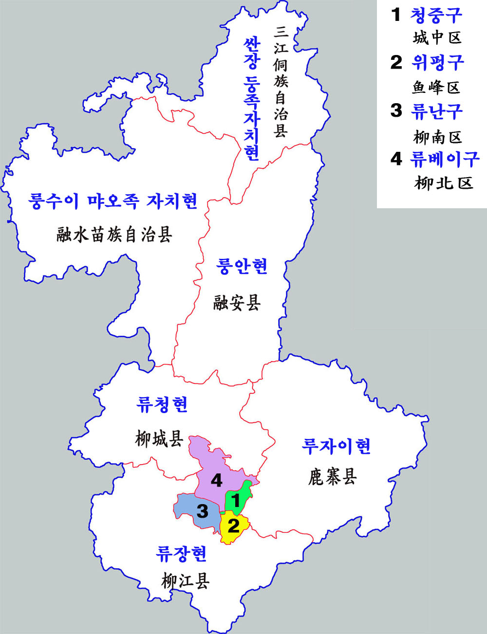 류저우시 현급구역도